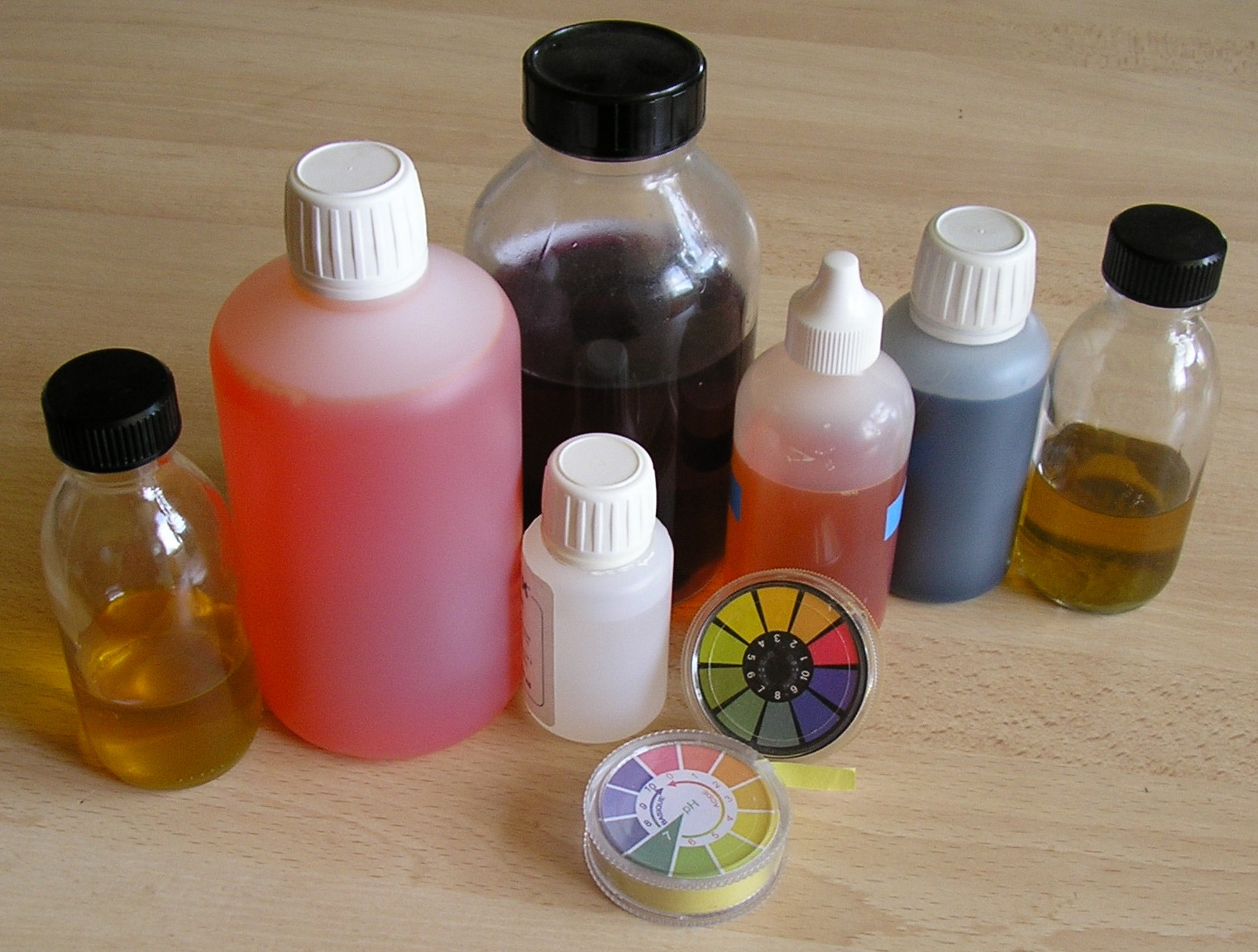 flacons d'indicateurs colorés de pH